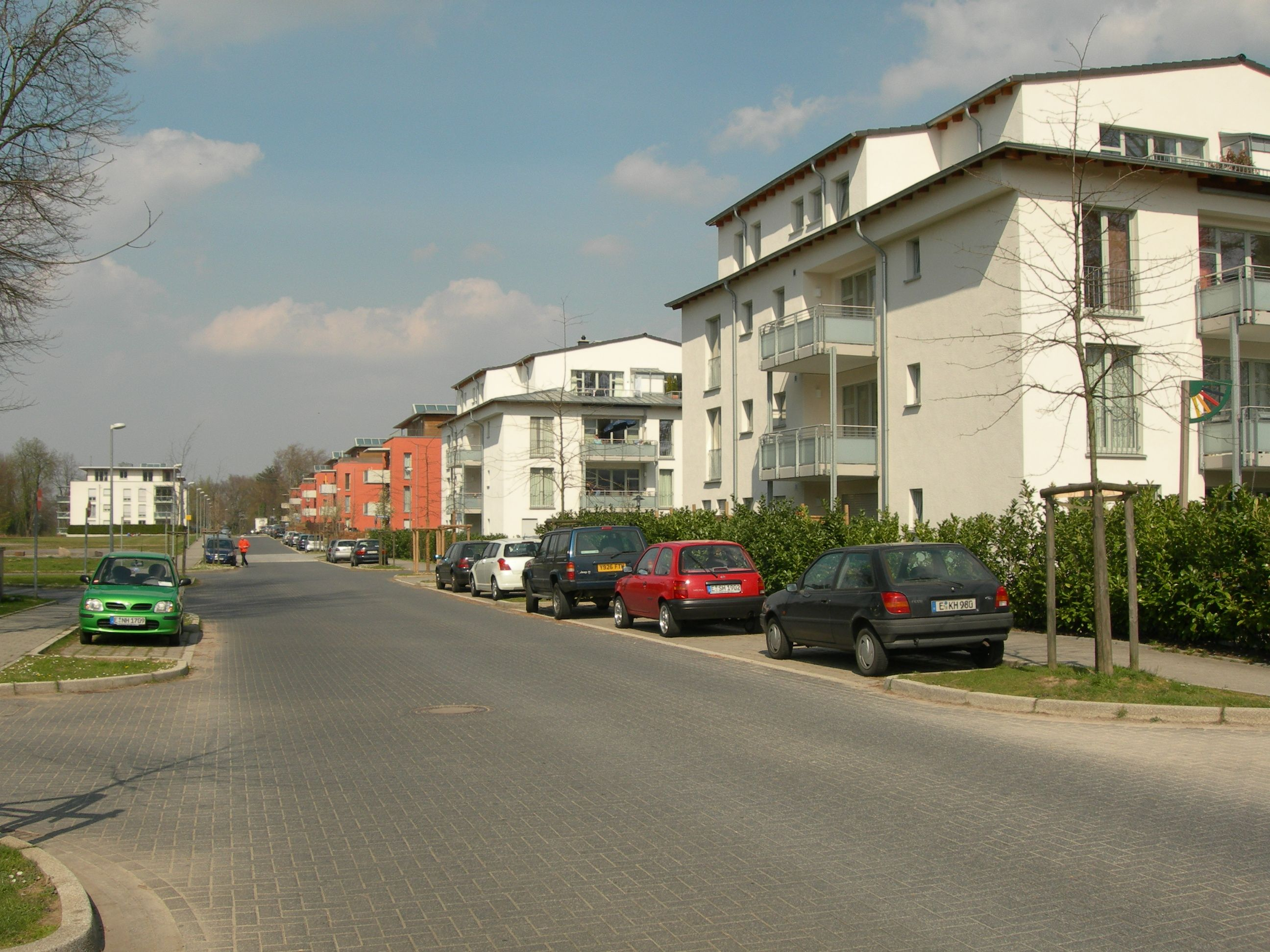 Dilldorfer Höhe, Neubaugebiet, Essen-Kupferdreh